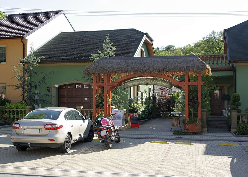 Bošovice - ul. Lipová, Papouščí zoo čp. 58